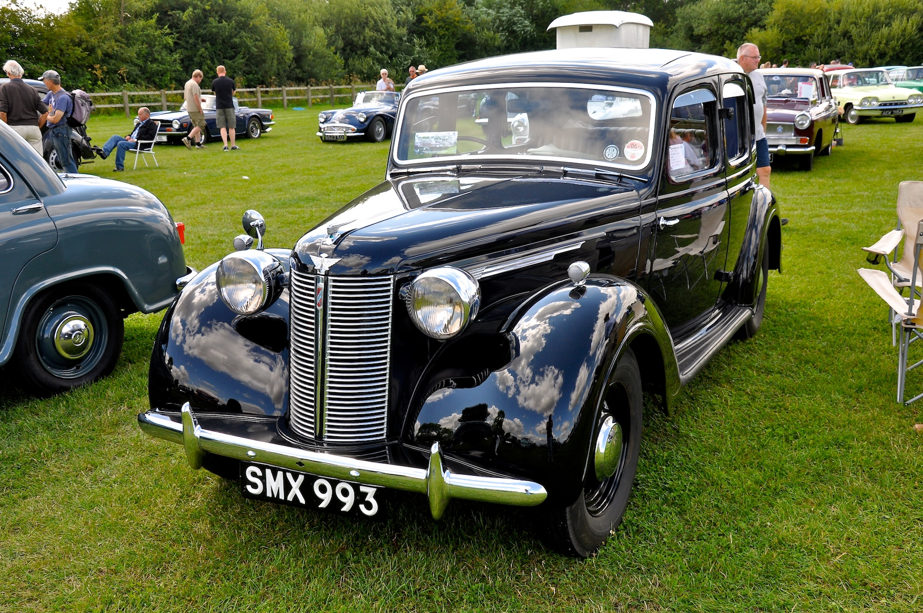 Austin 16 BSI Saloon 1948